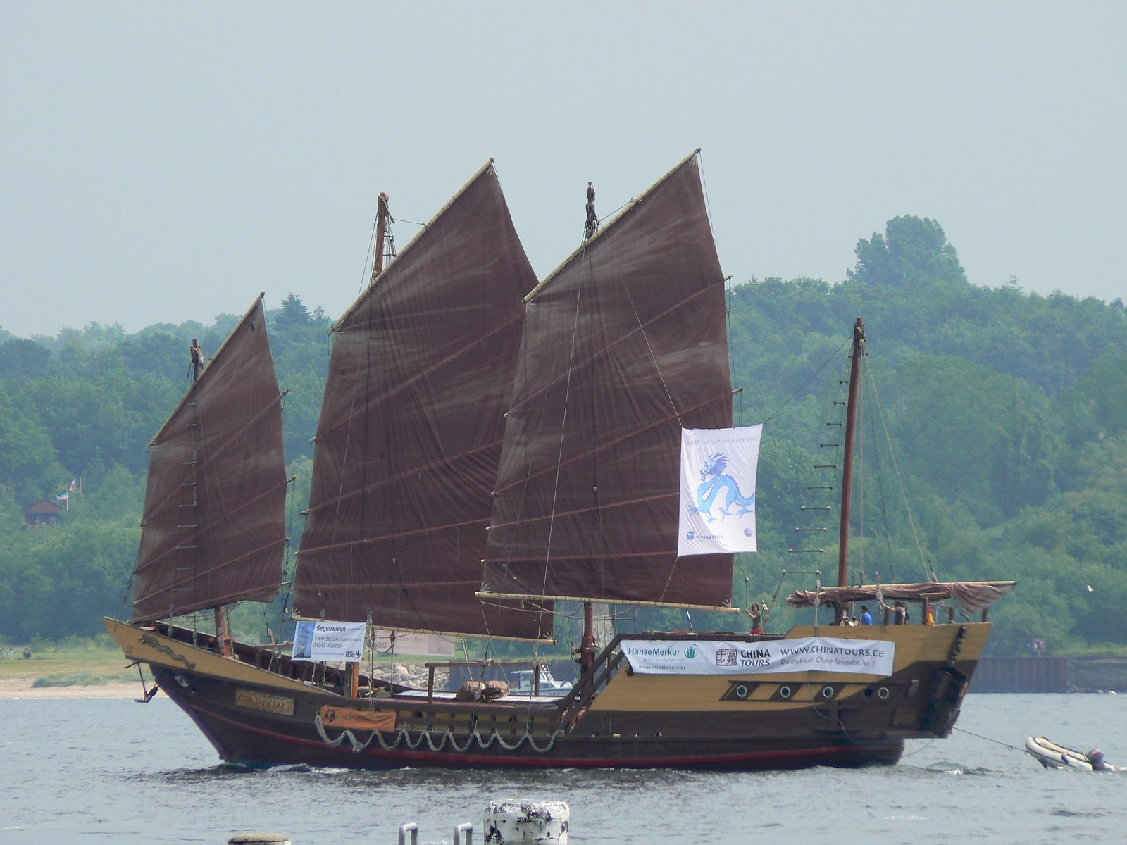 Segelschiff (Dschunke) Kublai's Khan II auf der Kieler Woche 2007. Typ: Traditionelle Indonesische Pinisi. Takelage: Dschunkenrigg. Baujahr: unbekannt (Umbau: 2003).